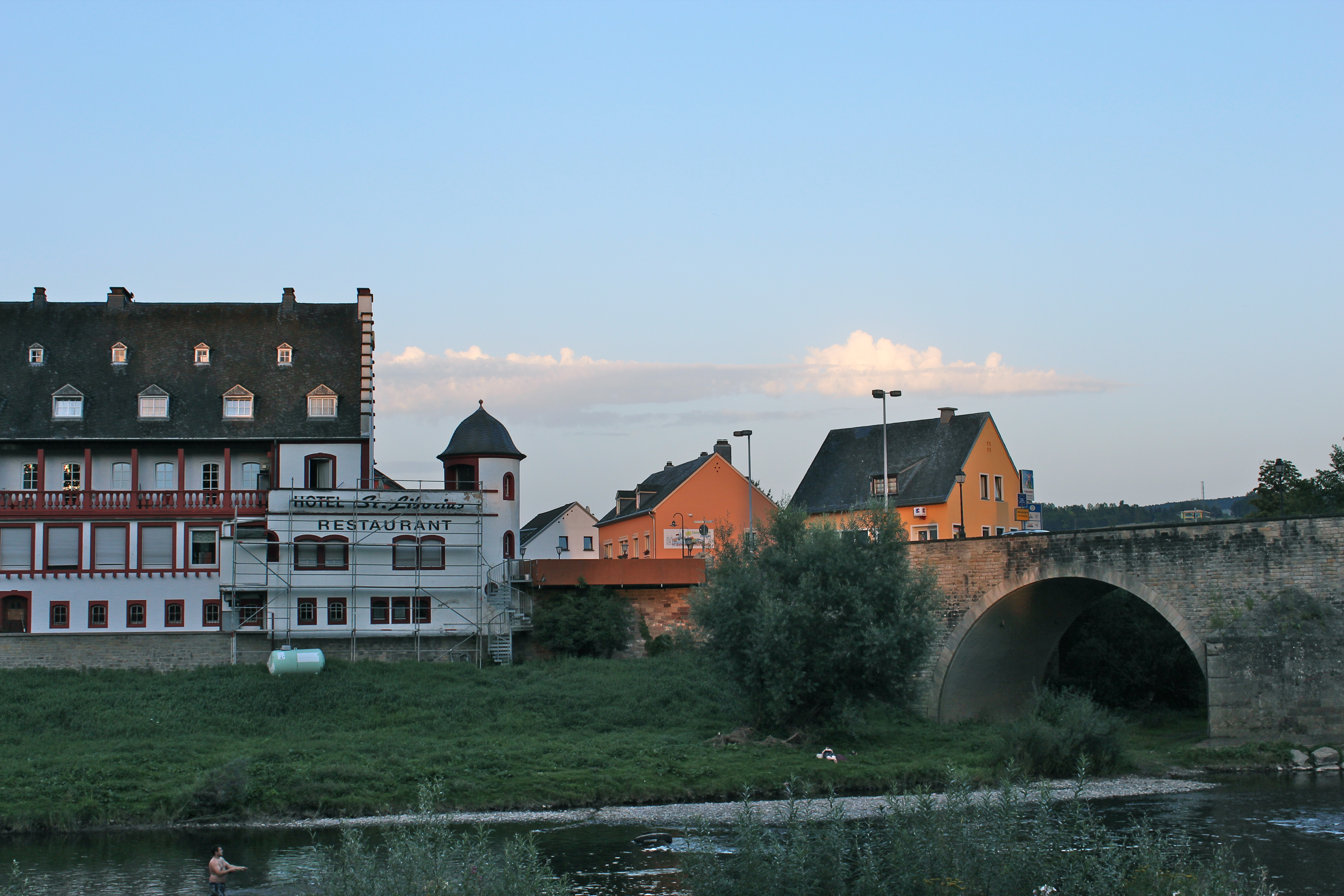 Teilansicht von Echternacherbrück, vom Luxemburger Sauerufer aus.